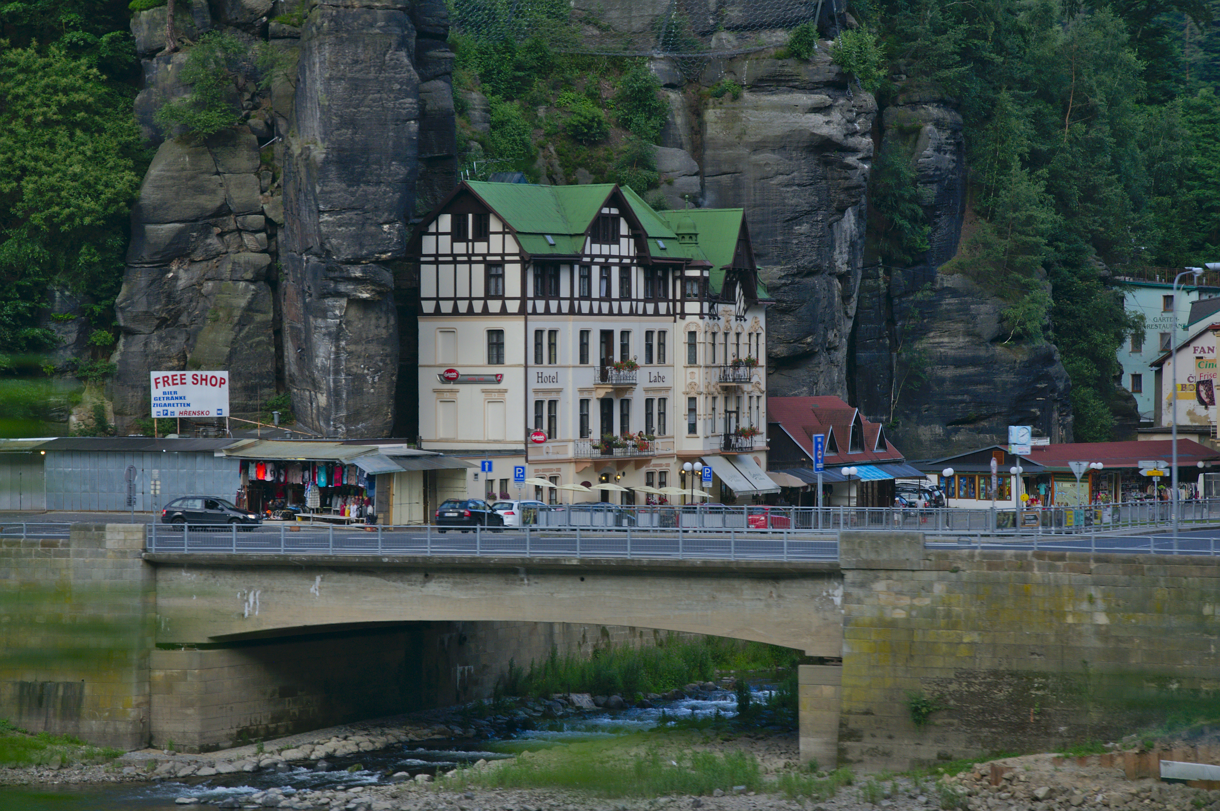 Hotel Labe, Hřensko, okres Děčín